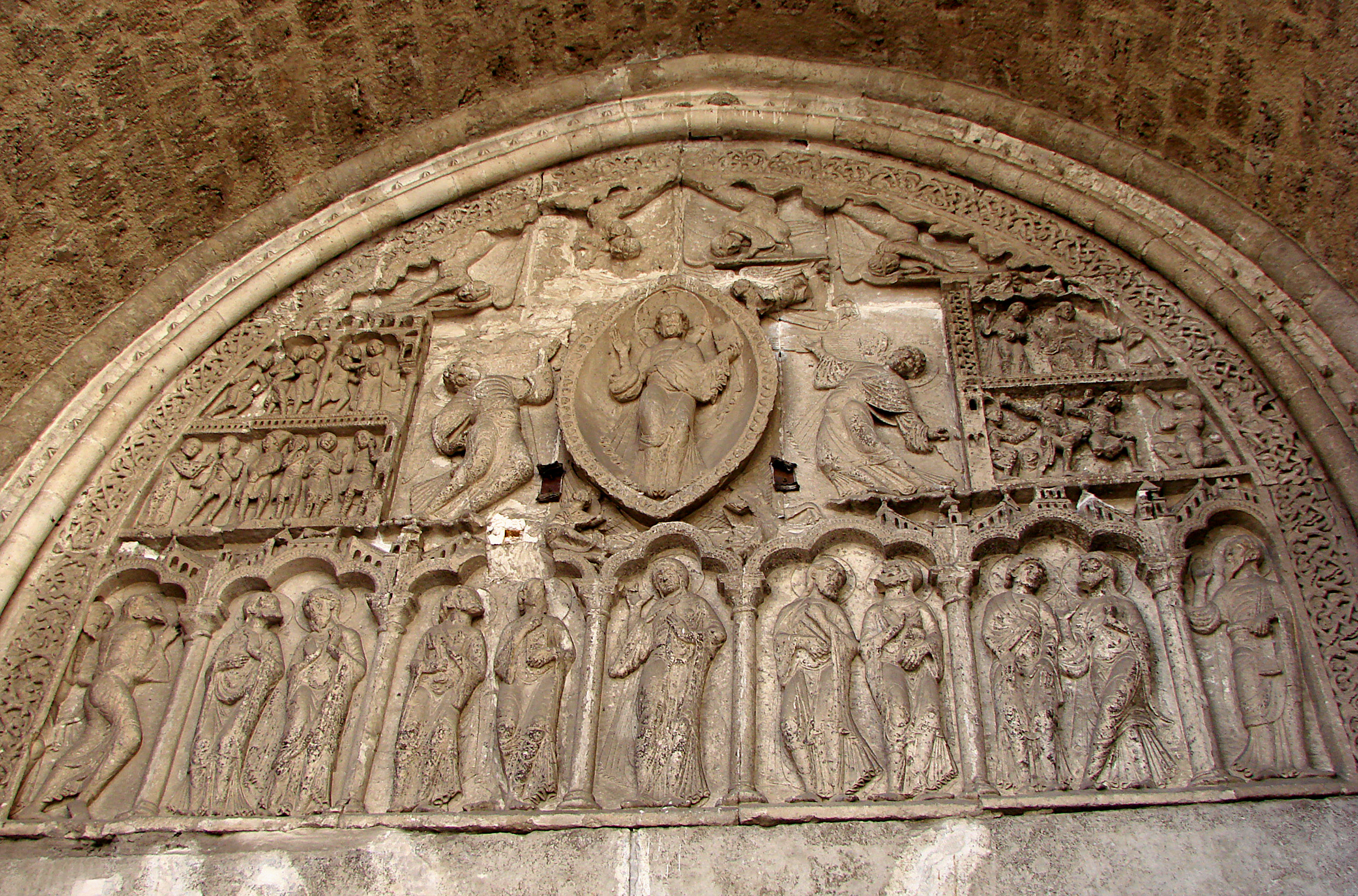 Tympan du portail Nord de la cathédrale Saint-Etienne de Cahors, 12ème siècle.